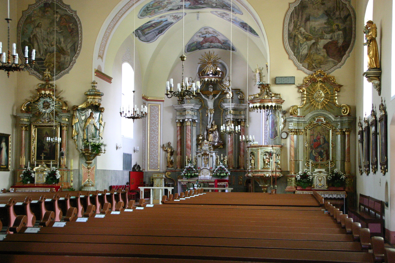 Racławiczki, ul. Plebiscytowa 3 - rzymskokatolicki kościół parafialny p.w. św. Marii Magdaleny, 1802.